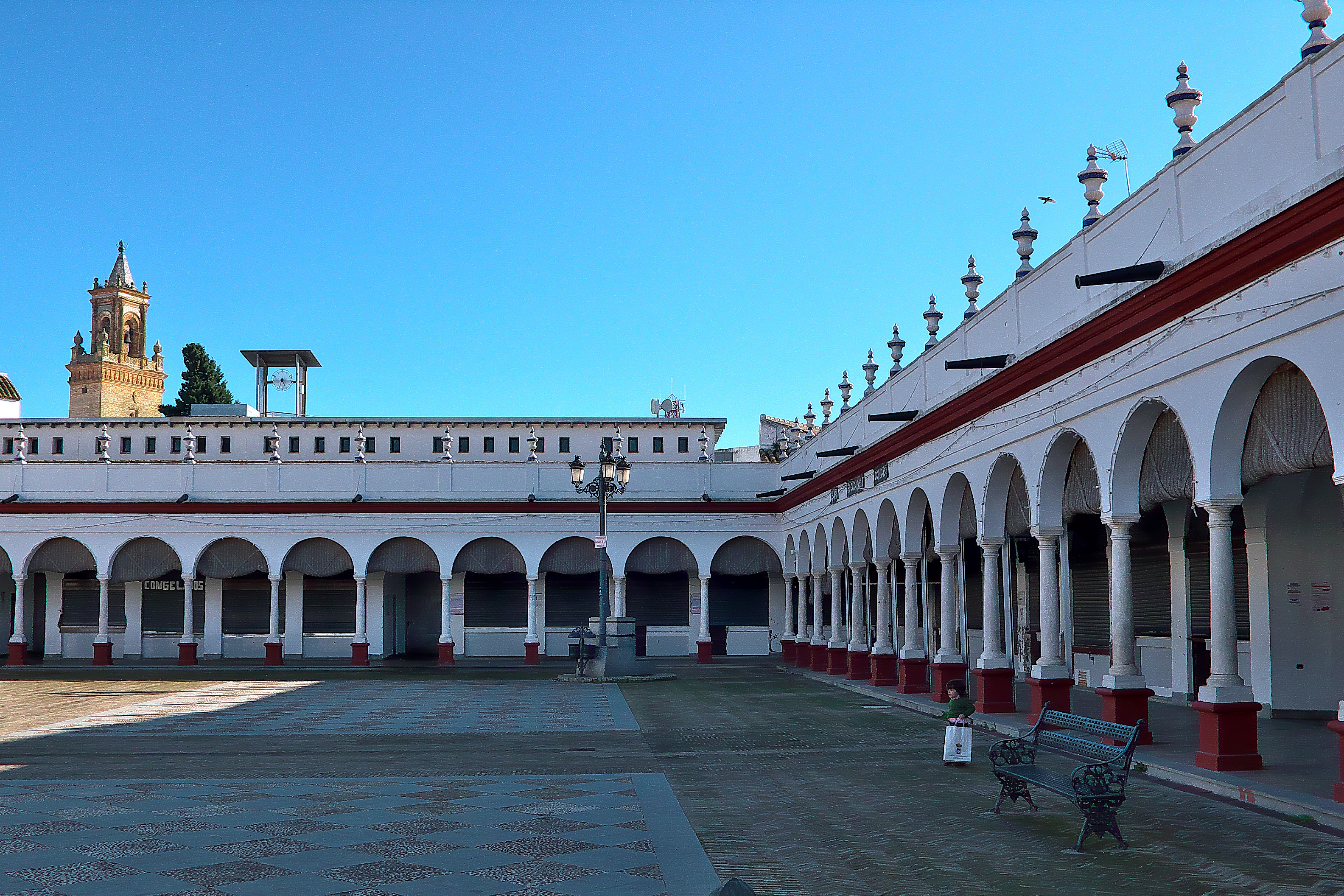 Edificada (1842) sobre el solar del antiguo Convento de Santa Catalina.